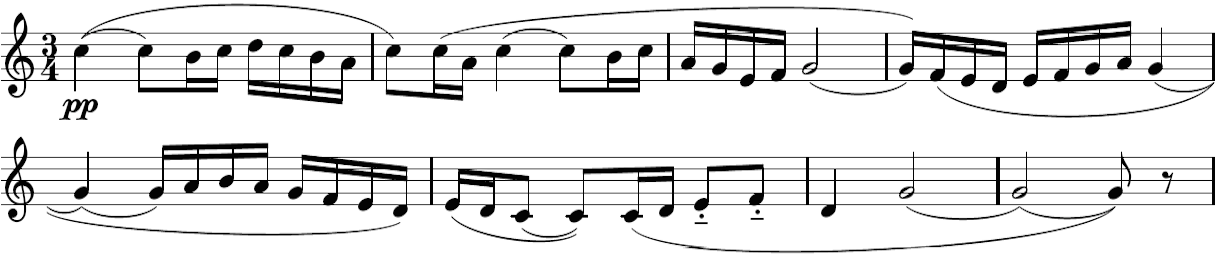 Antécédent du thème A du Boléro de Maurice Ravel